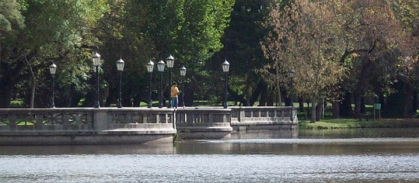 muelle en parque Cap. Gral. San Martin en 9 de julio, Buenos Aires, Rep. Argentina